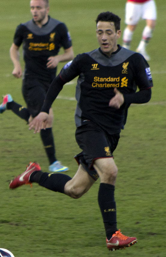 Krisztián Adorján playing for Liverpool U-21.